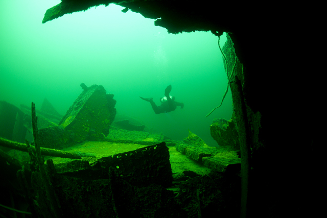 SS Gustaf Wasa, aft cargo compartment, Position: Sweden, Arkö, SW Arköbådan Unknown